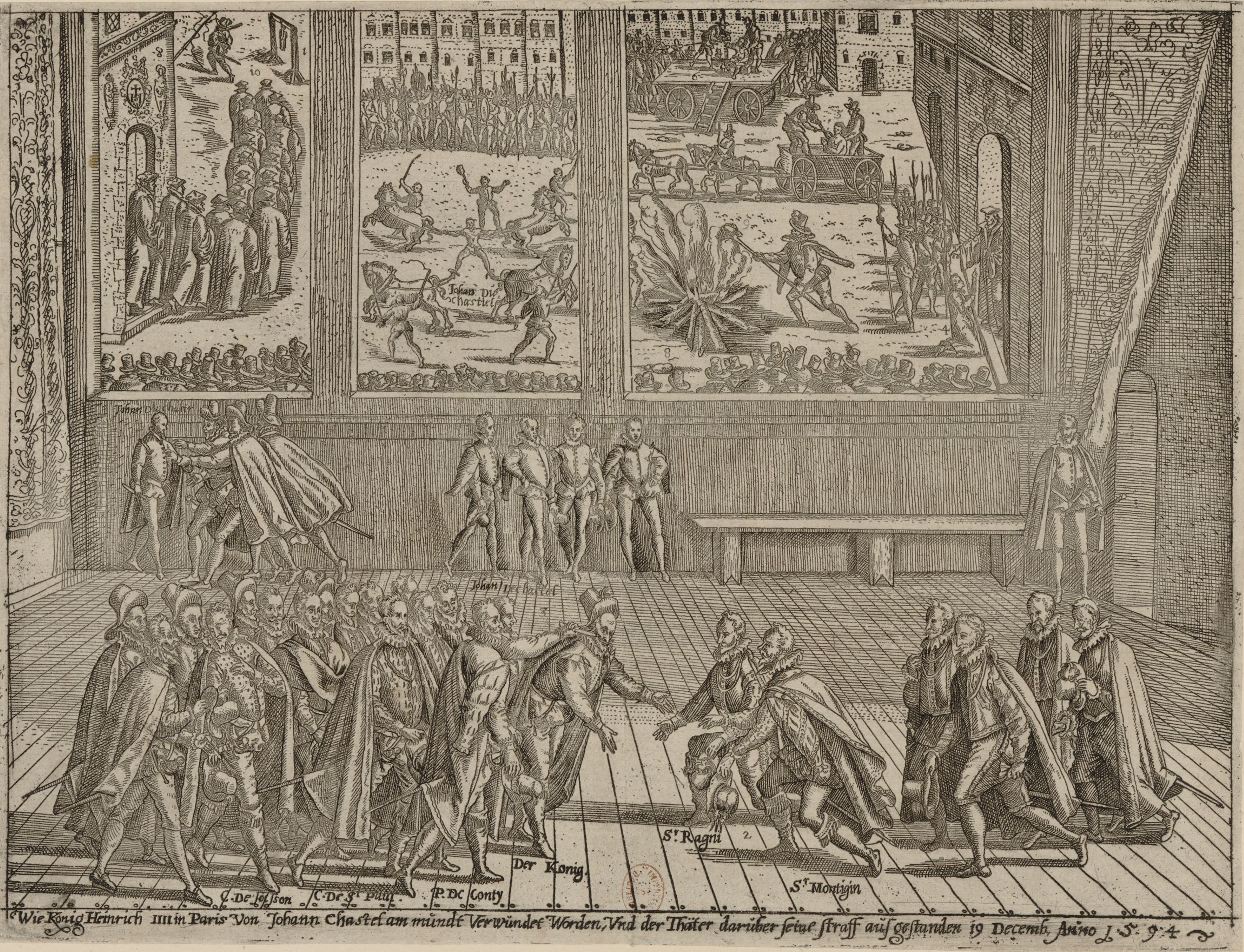 Attentat de Jean Châtel sur Henri IV. Le supplice de l'assassin est dépeint à l'arrière-plan.